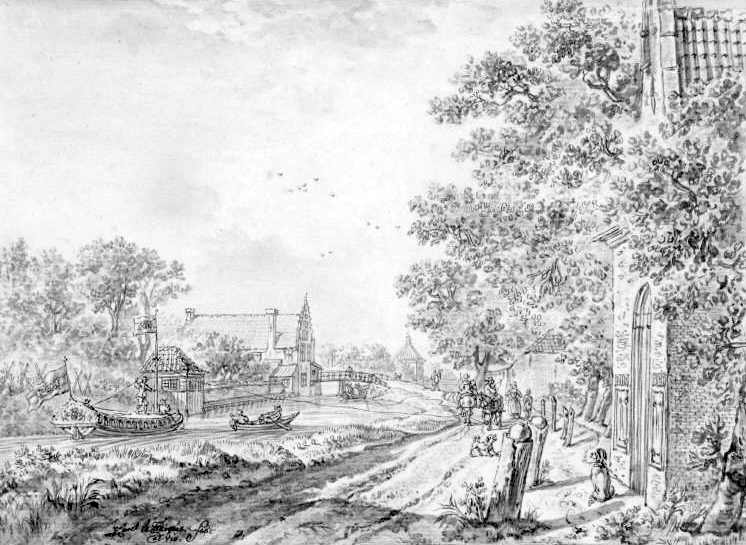 Gezicht op de Tolbrug van de Jan Tijssenweg ziend naar het noorden, met links de zij- en achtergevel van het huis Burchvliet, en in de verte, Hofwijck.